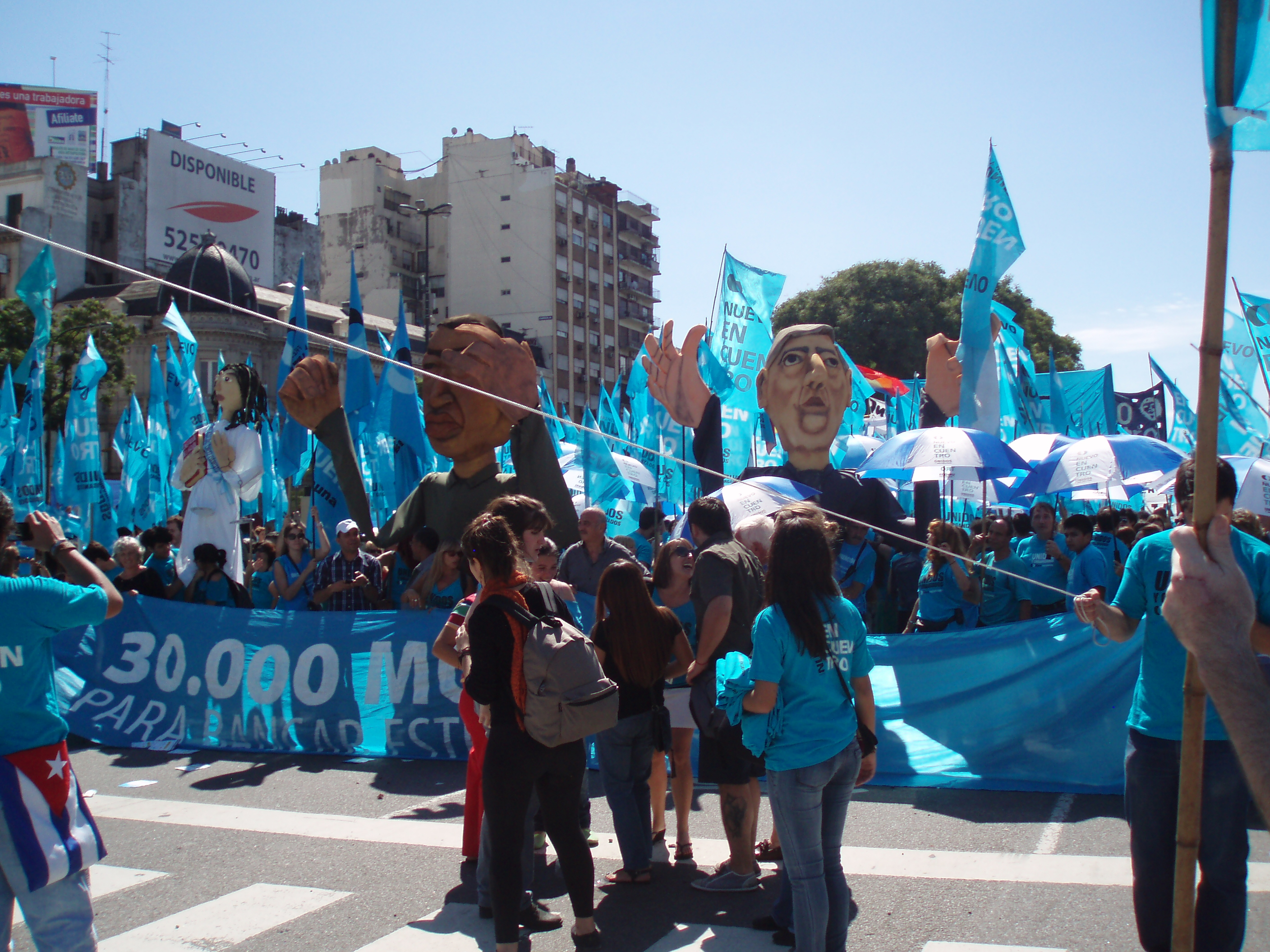 Columna de Nuevo Encuentro el 24 de marzo de 2013, en Buenos Aires.